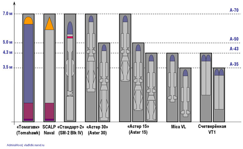 Типы ракет и типоразмеры контейнеров, используемых (или планируемых к использованию) в установке вертикального пуска Sylver (Франция).